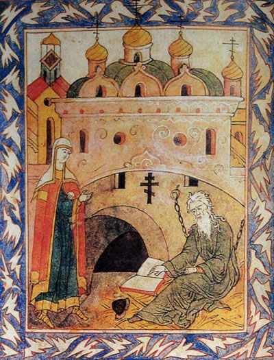 Boyarynya Morozova and Avvakym Боярыня Морозова навещает протопопа Аввакума